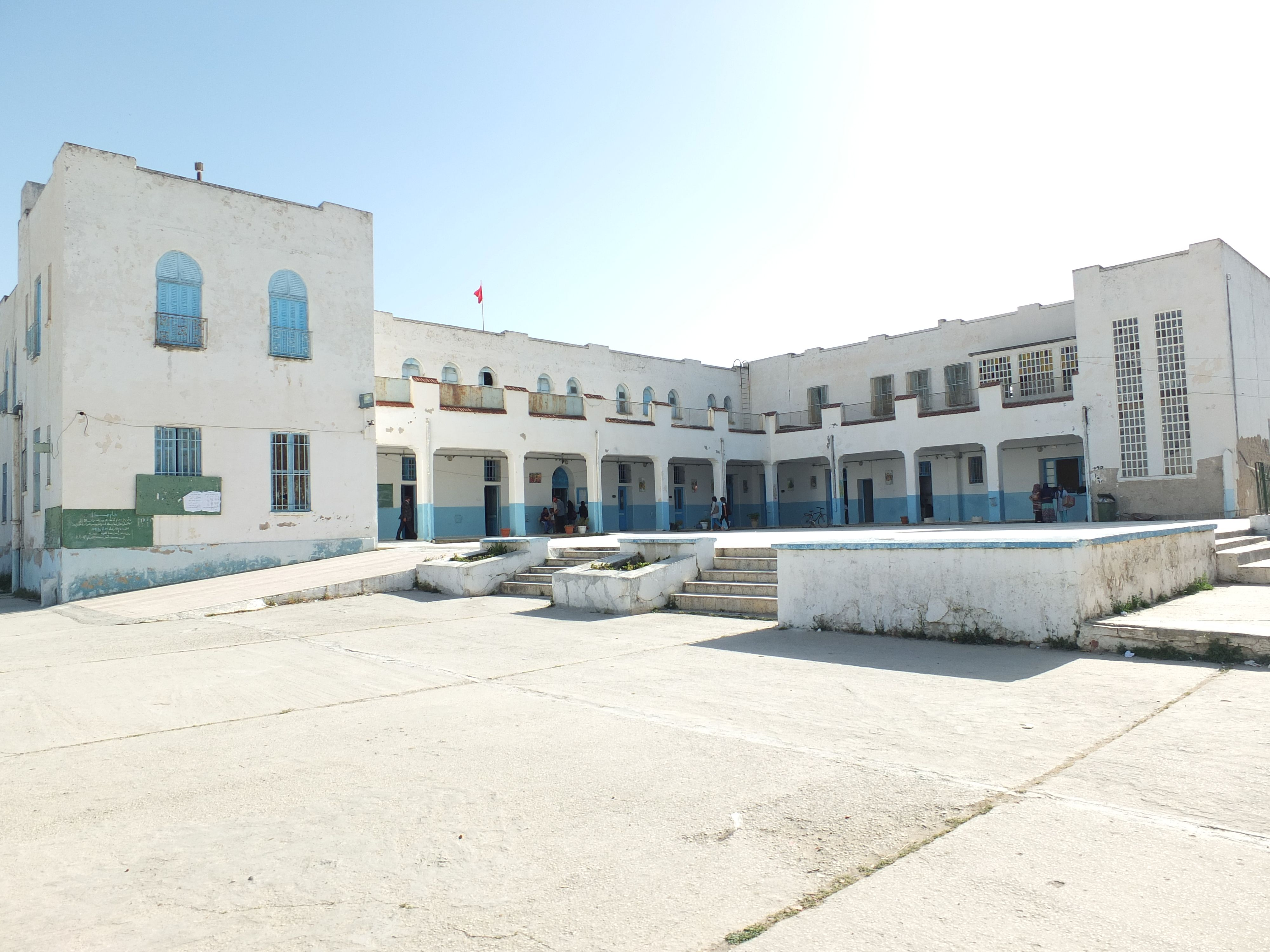 Lycée Bou-Salem est un lycée situé au nord-ouest de la Tunisie.